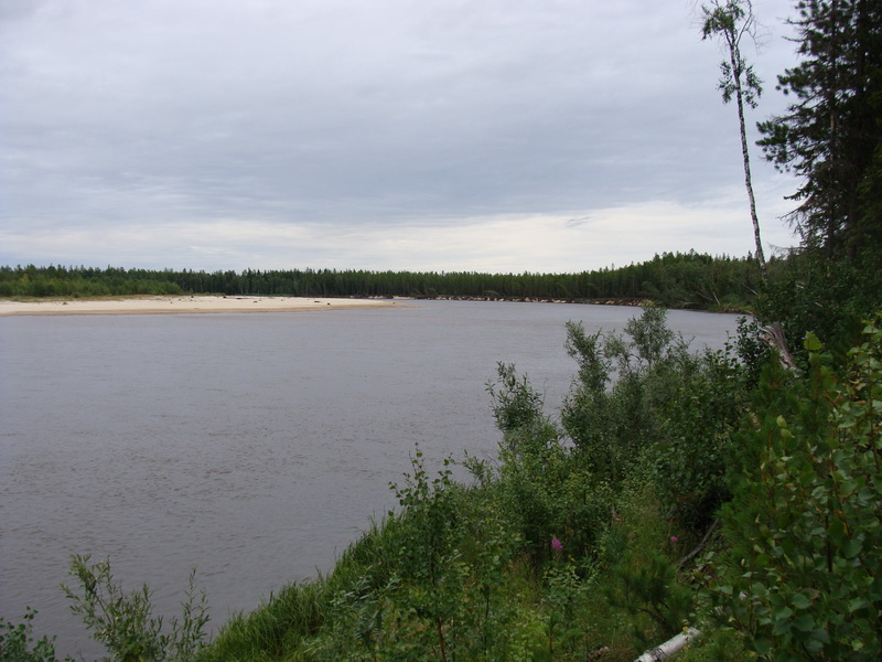 Изображение реки Пякупур